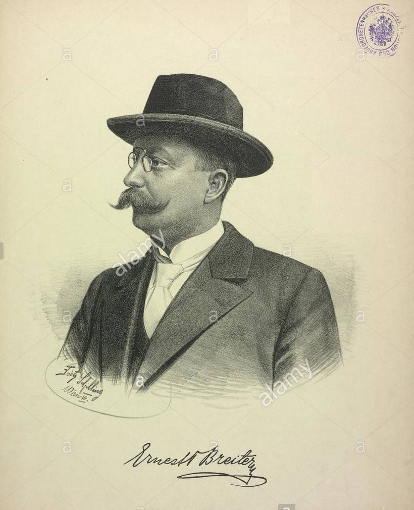 Breiter, Ernest (1865-1935)